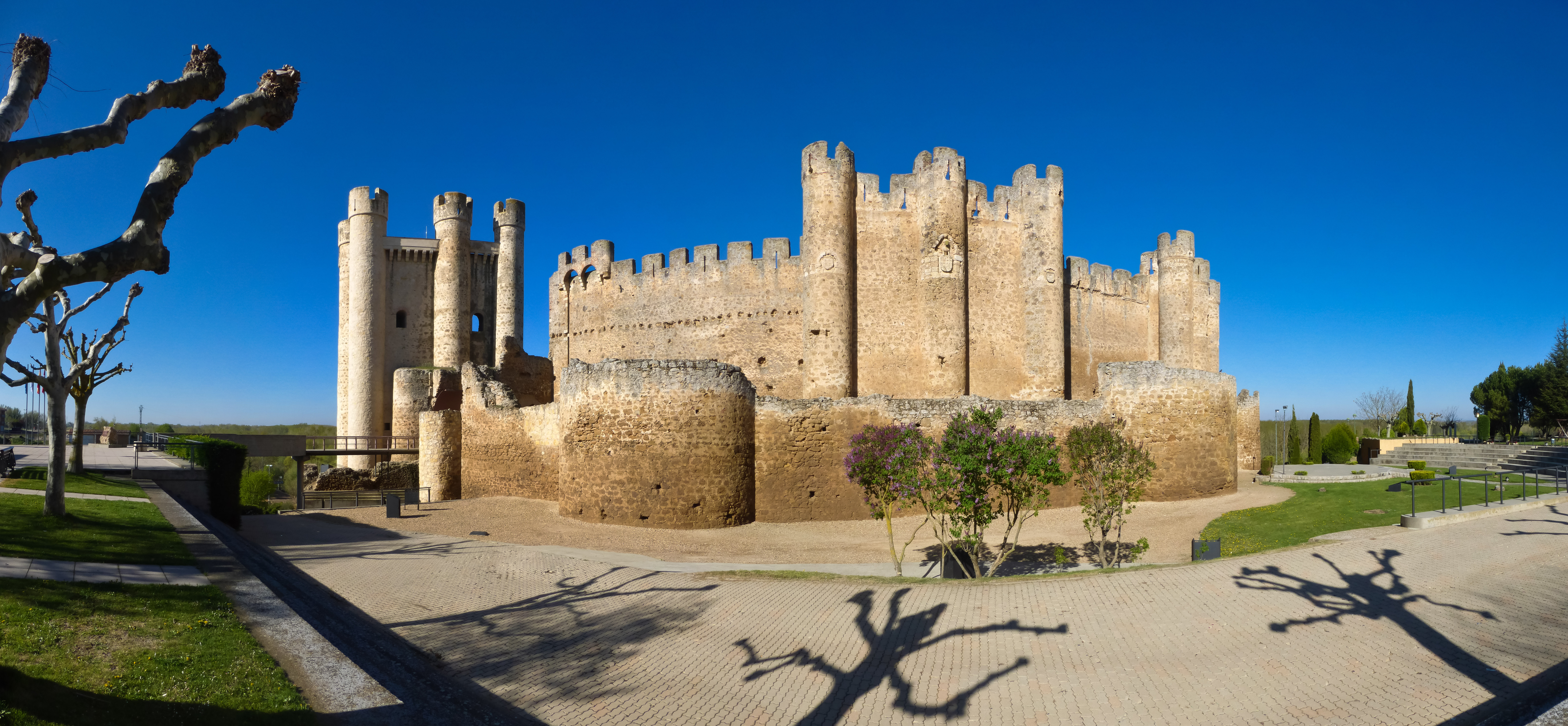 Castillo de Valencia de Don Juan